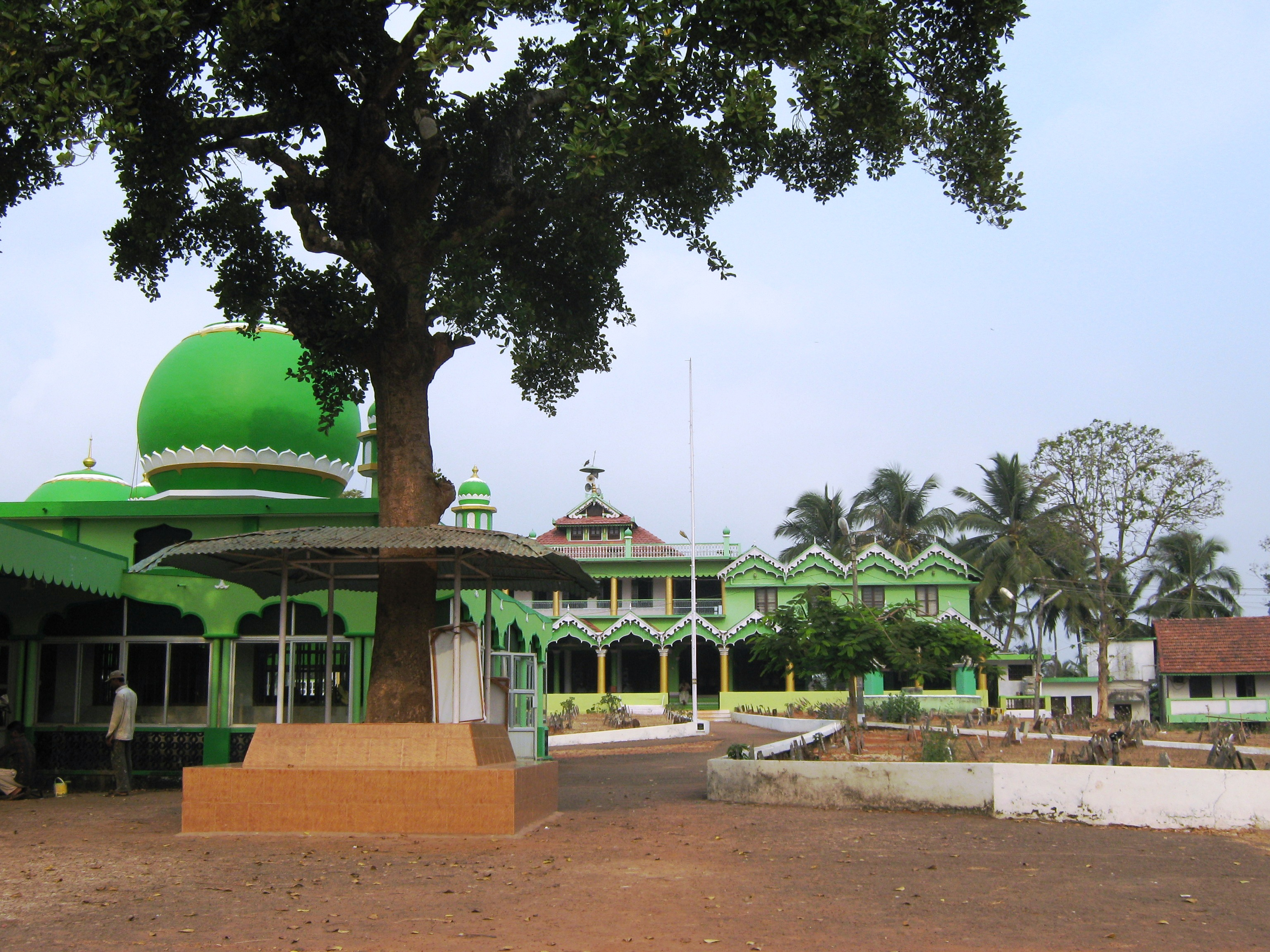 Kasaragod, Kerala, India.